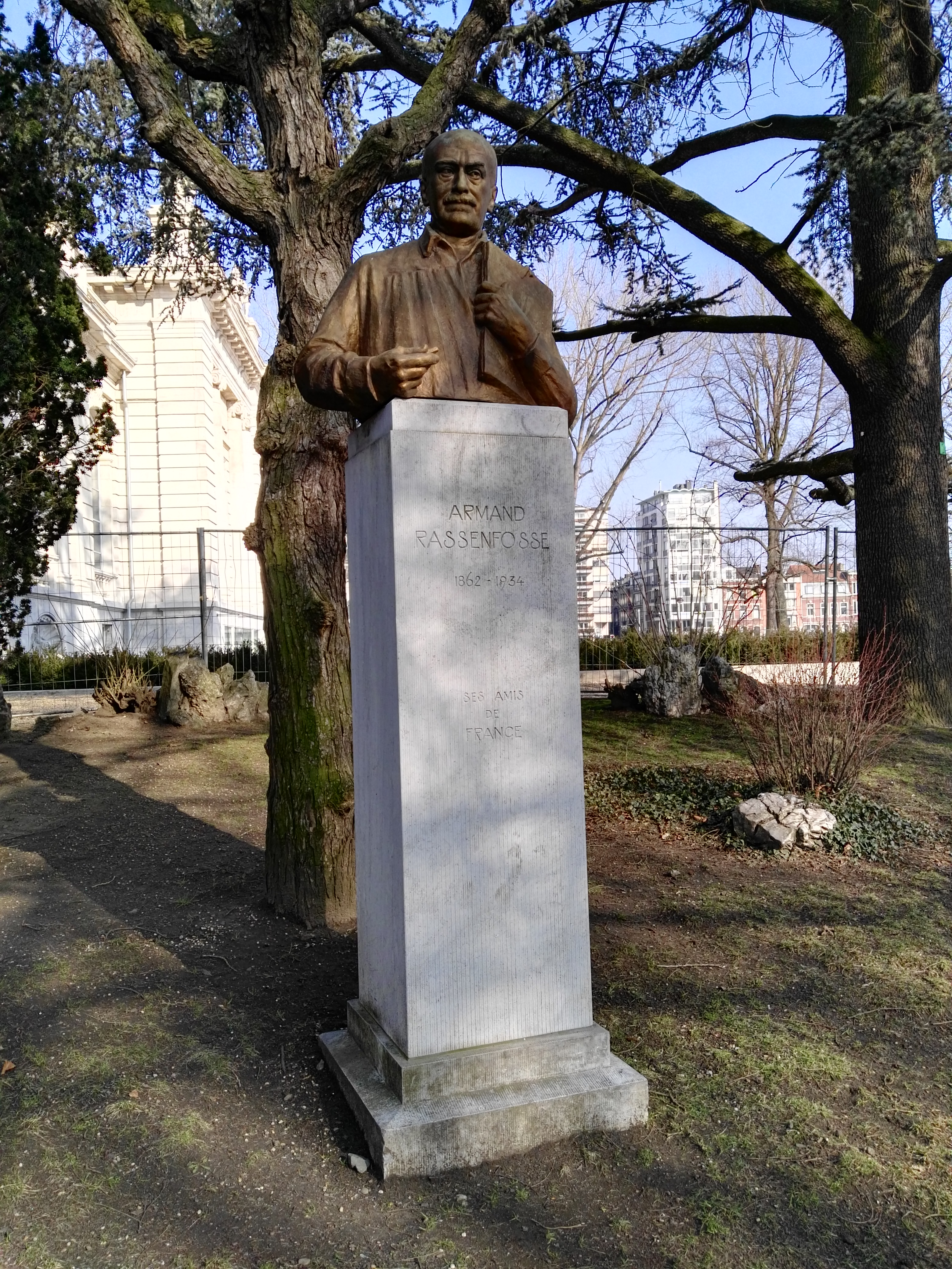 Buste d'Armand Rassenfosse